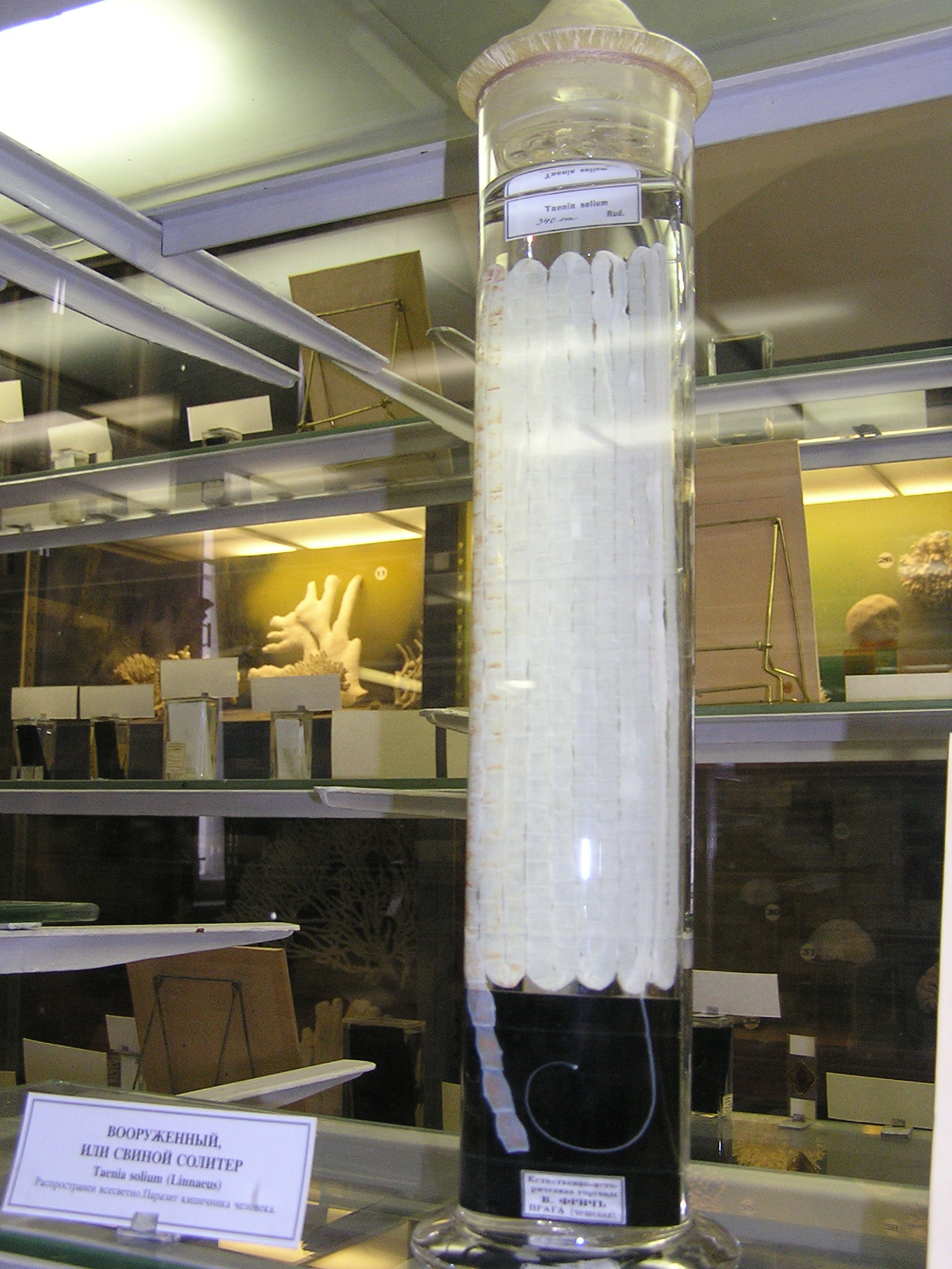 Зоологический музей в Санкт-Петербурге. Свиной солитер